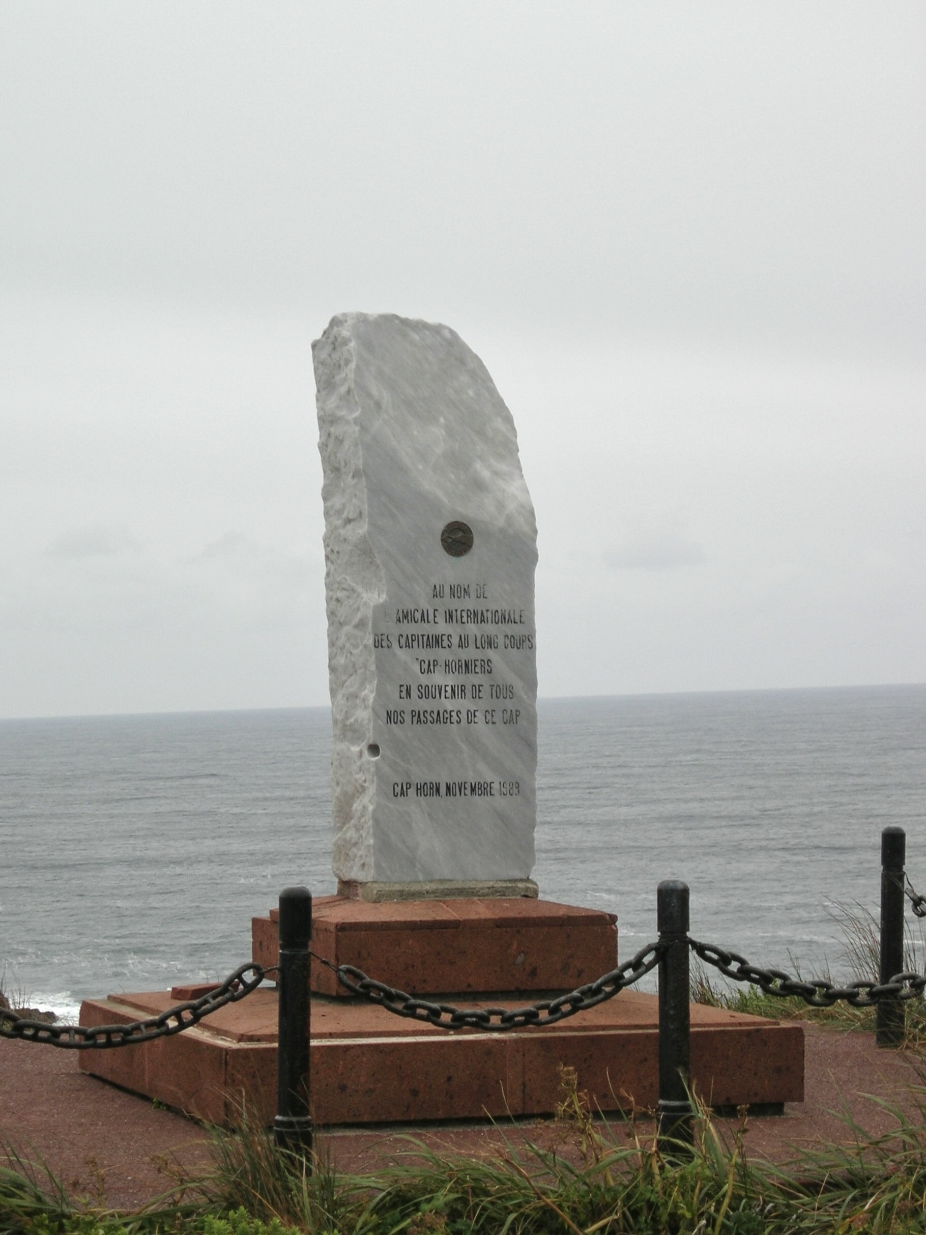 Stele der Kap Hoorniers auf der Hoorn-Insel (Chile), auf der Kap Hoorn liegt. Aufschrift (im Original alles in Großbuchstaben): Im Namen der Internationalen Bruderschaft der Langstreckenkapitäne, Kap Hoorniers, in Erinnerung an all unsere Umrundungen dieses Kaps Kap Hoorn, November 1989 (frz. Original: au nom de l'amicale internationale des capitaines au long cours 'cap-horniers en souvenir de tous nos passages de ce cap // cap horn, novembre 1989)